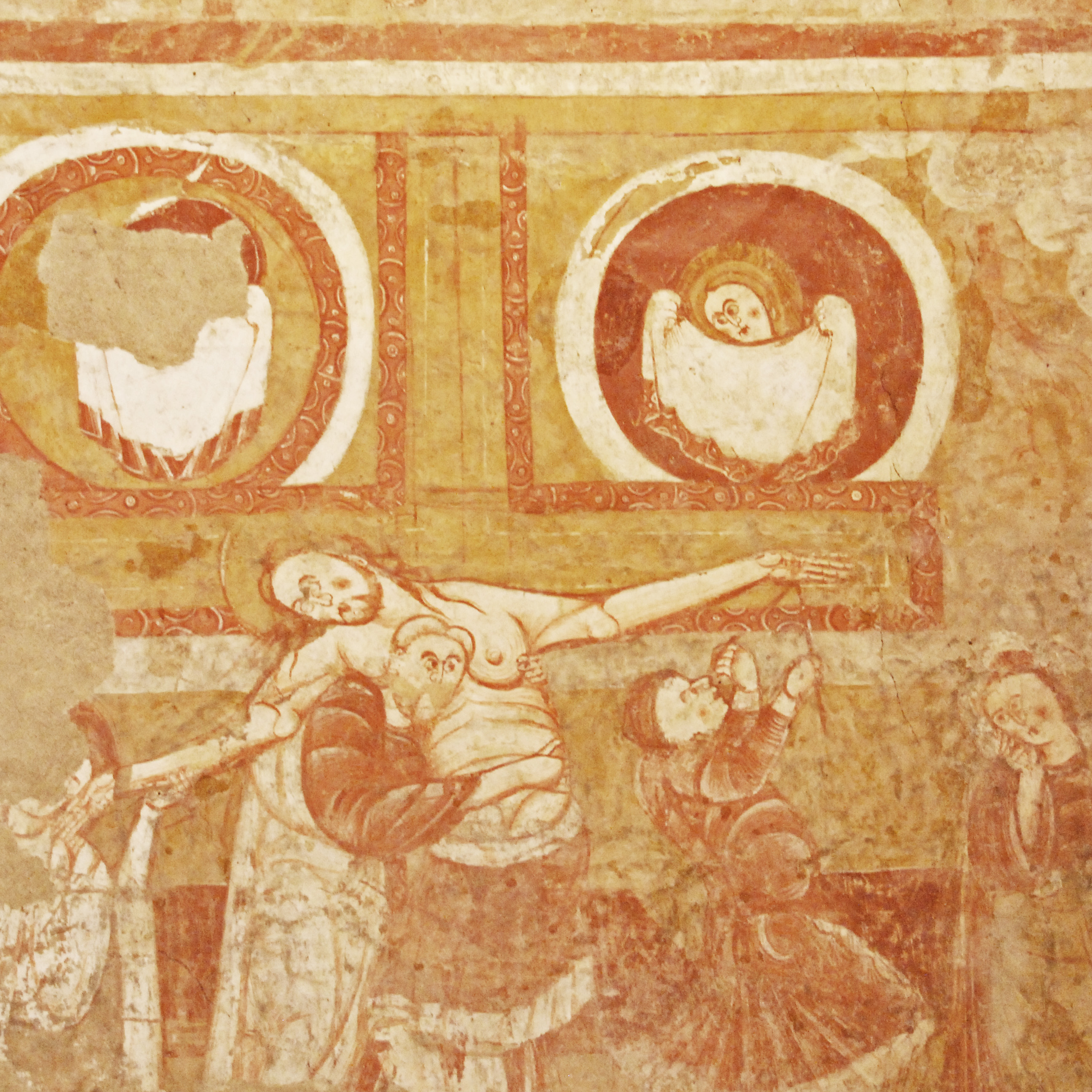 Schiff, Ostwand, Kreuzabnahme Jesu